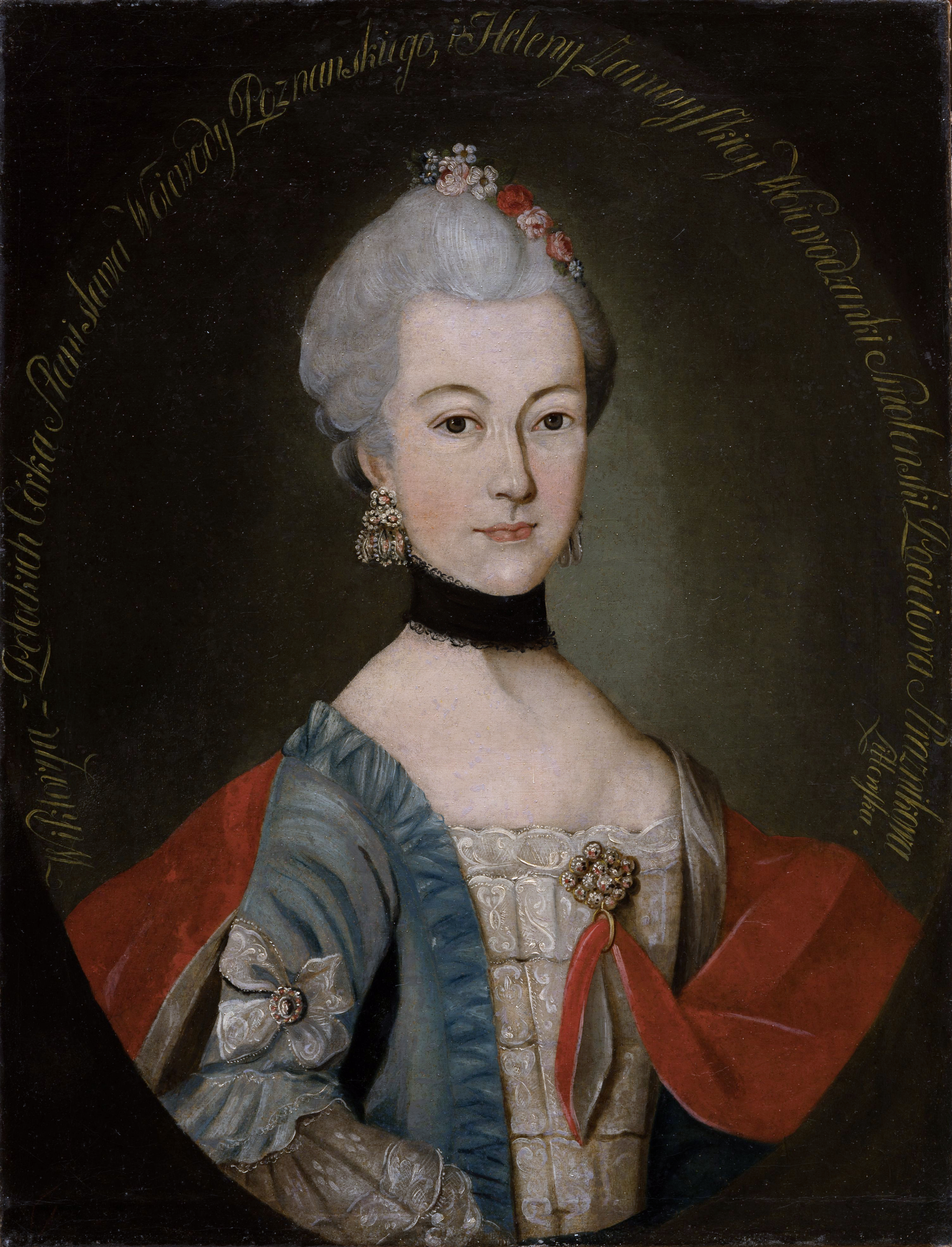 Беларуская (тарашкевіца): Партрэт Вікторыі Пацей (Viktoryja Paciej) з роду Патоцкіх (Patocki)